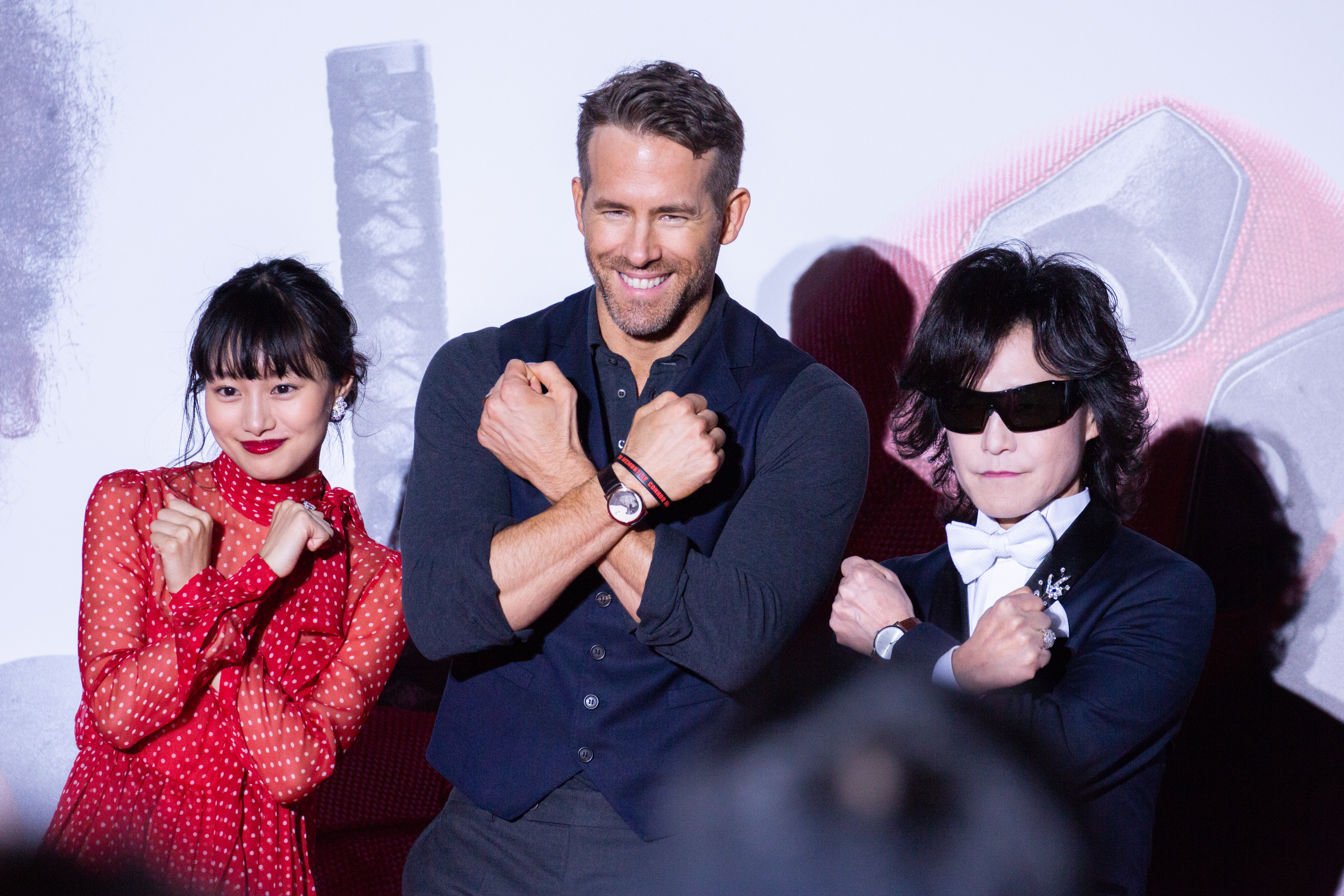 デッドプール2 ジャパン・プレミア レッドカーペットライアン・レイノルズ 忽那汐里 Toshl